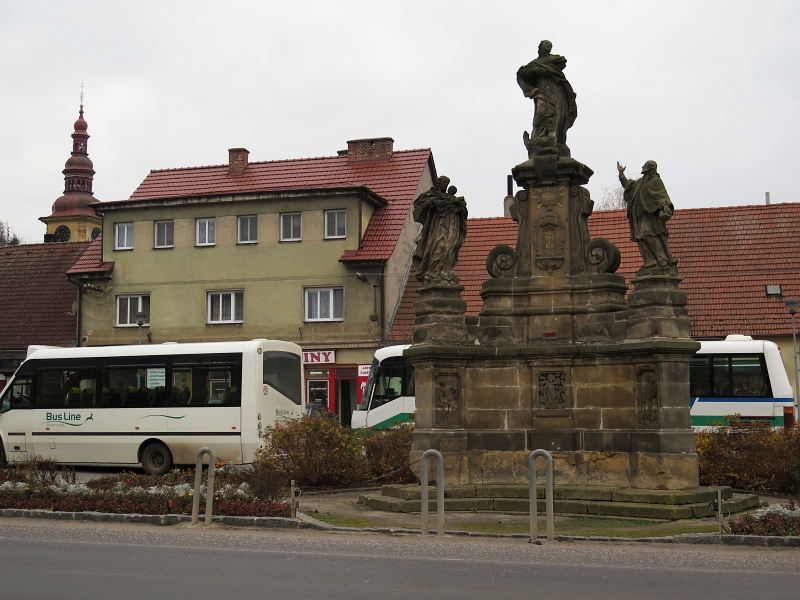 Sousoší Panny Marie, Hilmarovo náměstí, Kopidlno.